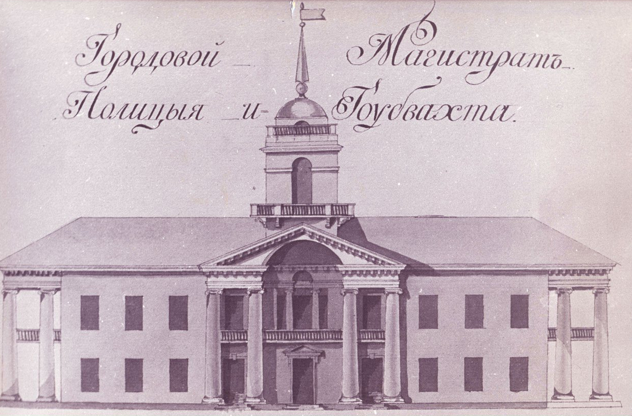 Беларуская (тарашкевіца): Менск (Miensk), пляц Высокі Рынак (plac Vysoki Rynak). Ратуша